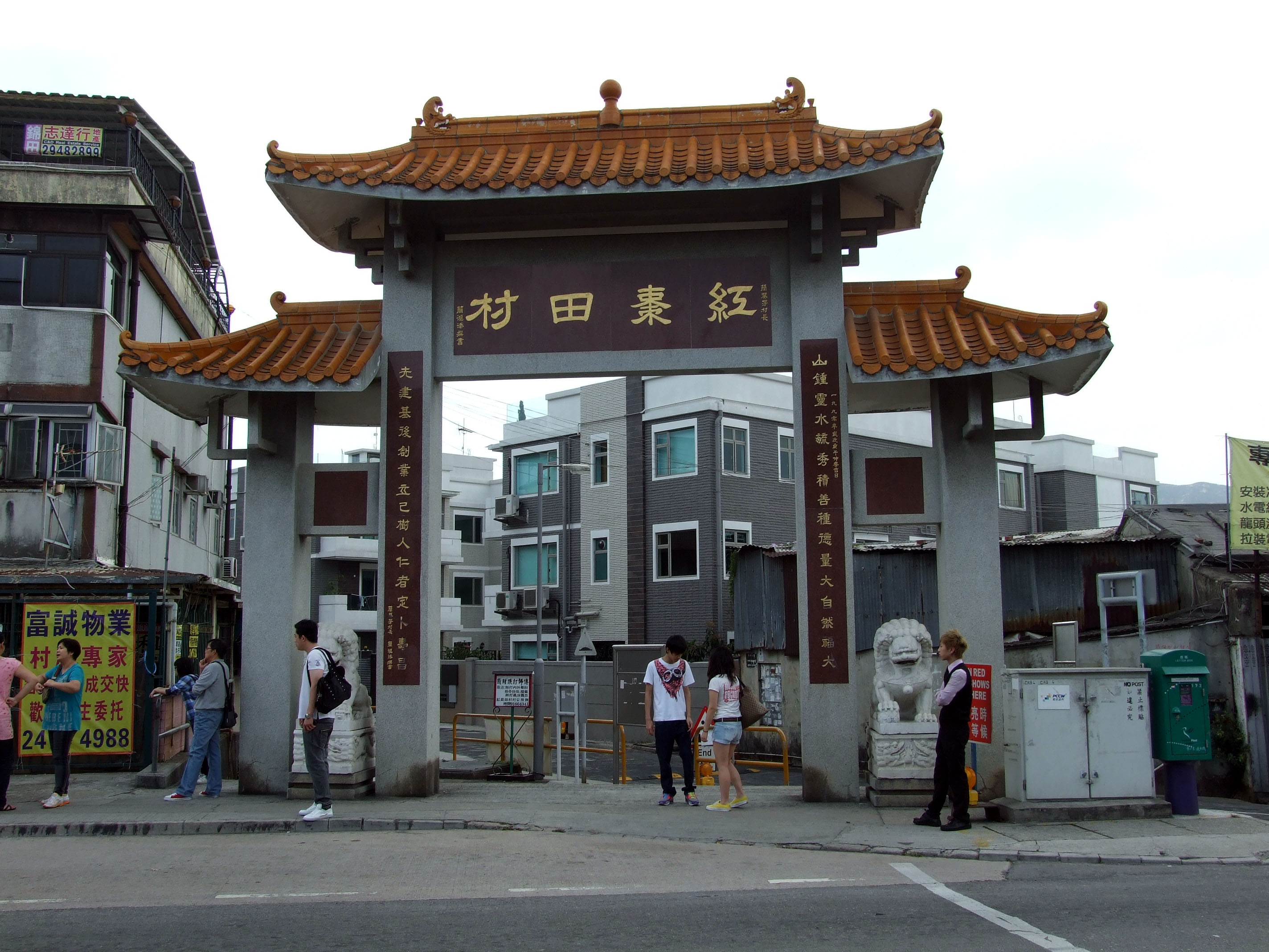 中文（香港）: 紅棗田村牌樓